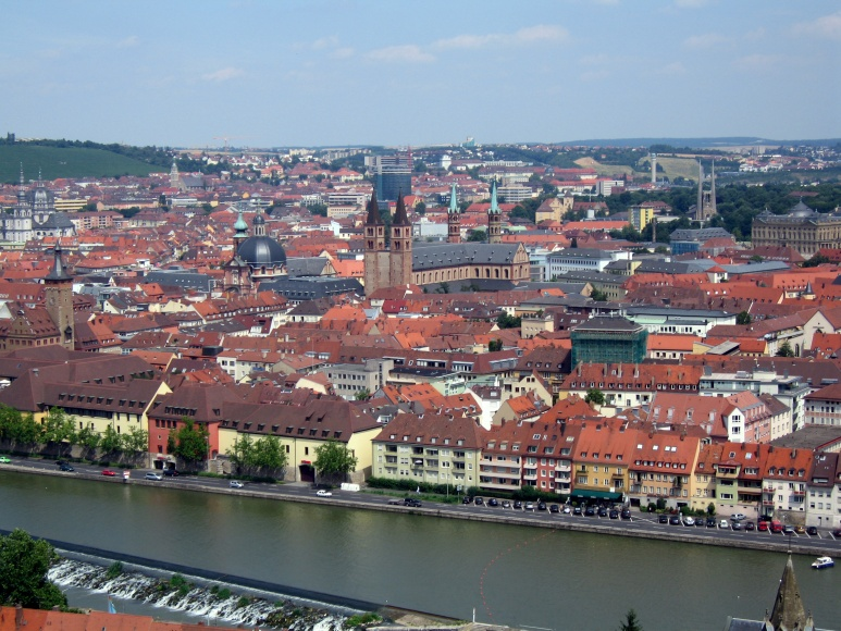 Würzburg - widok z zamku "Marienberg".